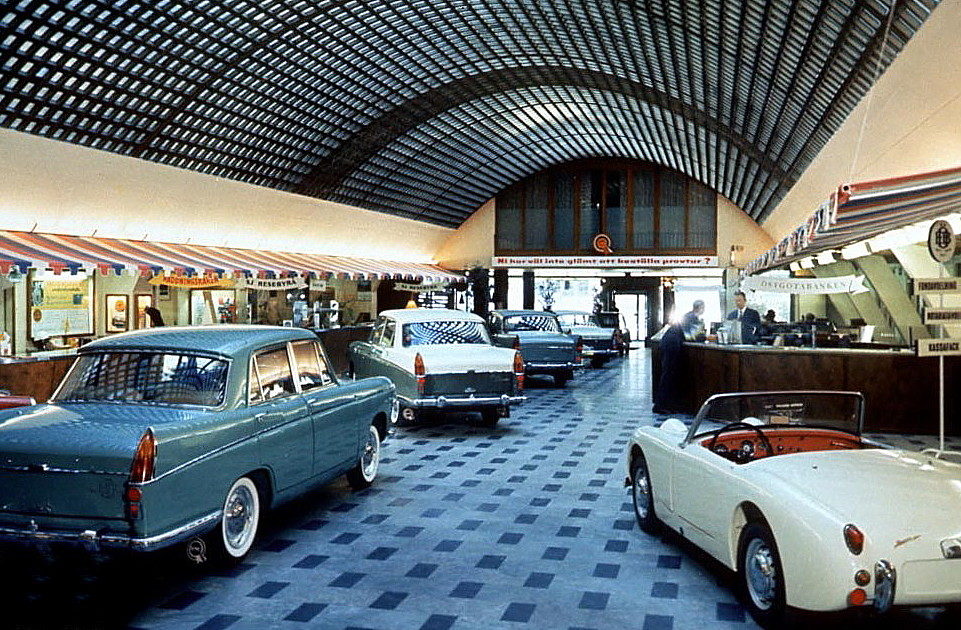 Ostermans bilhall vid Birger Jarlsgatan